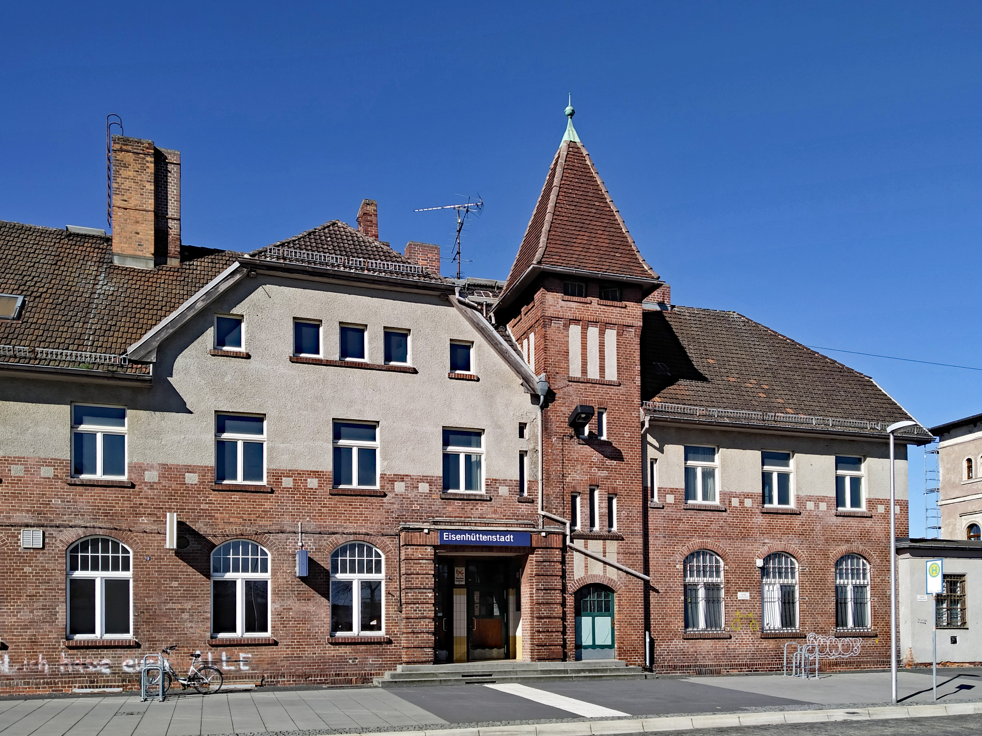 Bahnhof Eisenhüttenstadt - der Turm wurde ursprünglich als Wasserturm genutzt Quelle: Sabine von Wangenheim "Brandenburger Wassertürme als Repräsentanten historischer Behälterformen"